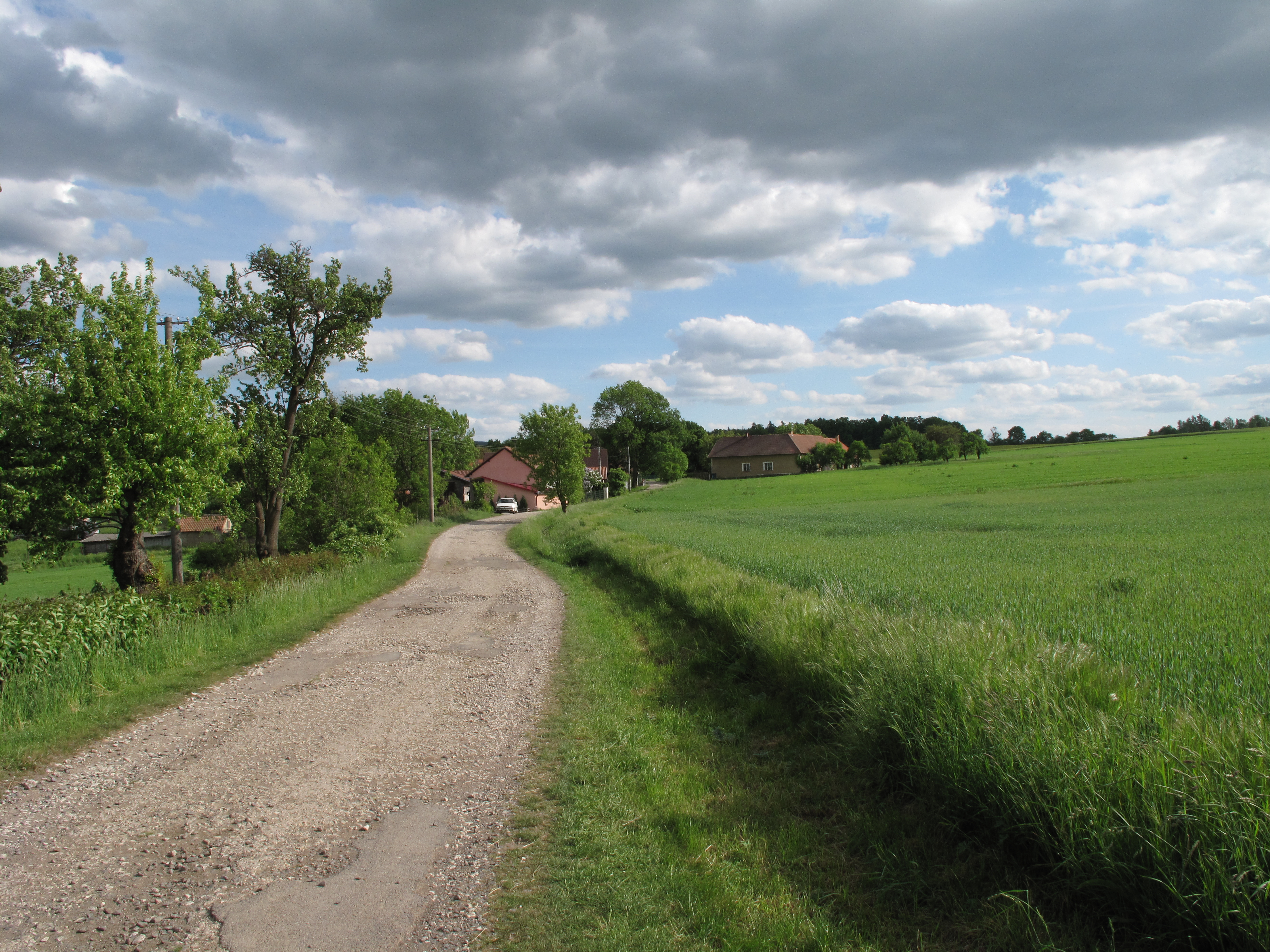 Domy v Kočvarech. Okres Beroun, Česká republika.